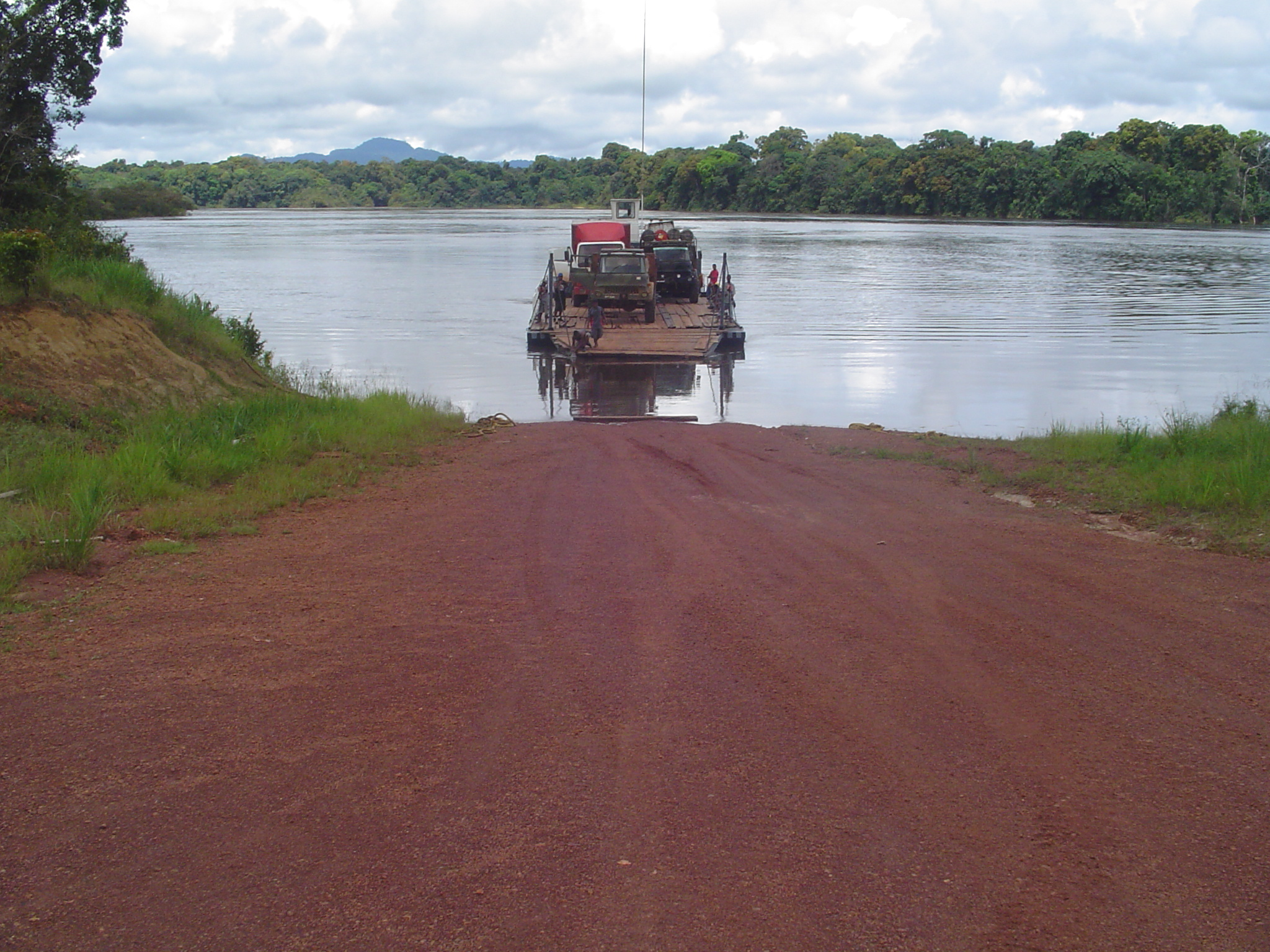 Pontoon Crossing at Mango Landing, Essequibo River Pontoon_Crossing_at_Mango_Landing_Essequibo_River.jpg